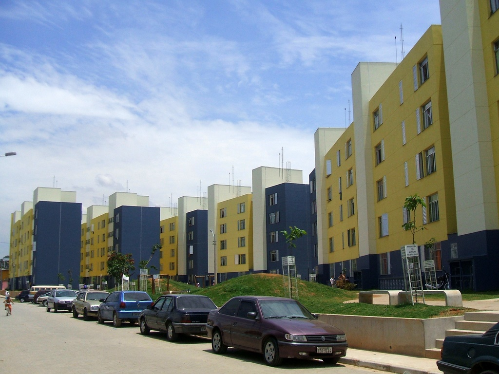 Obras de urbanização na favela Nova Jaguaré, no distrito do Jaguaré, cidade de São Paulo, Brasil.